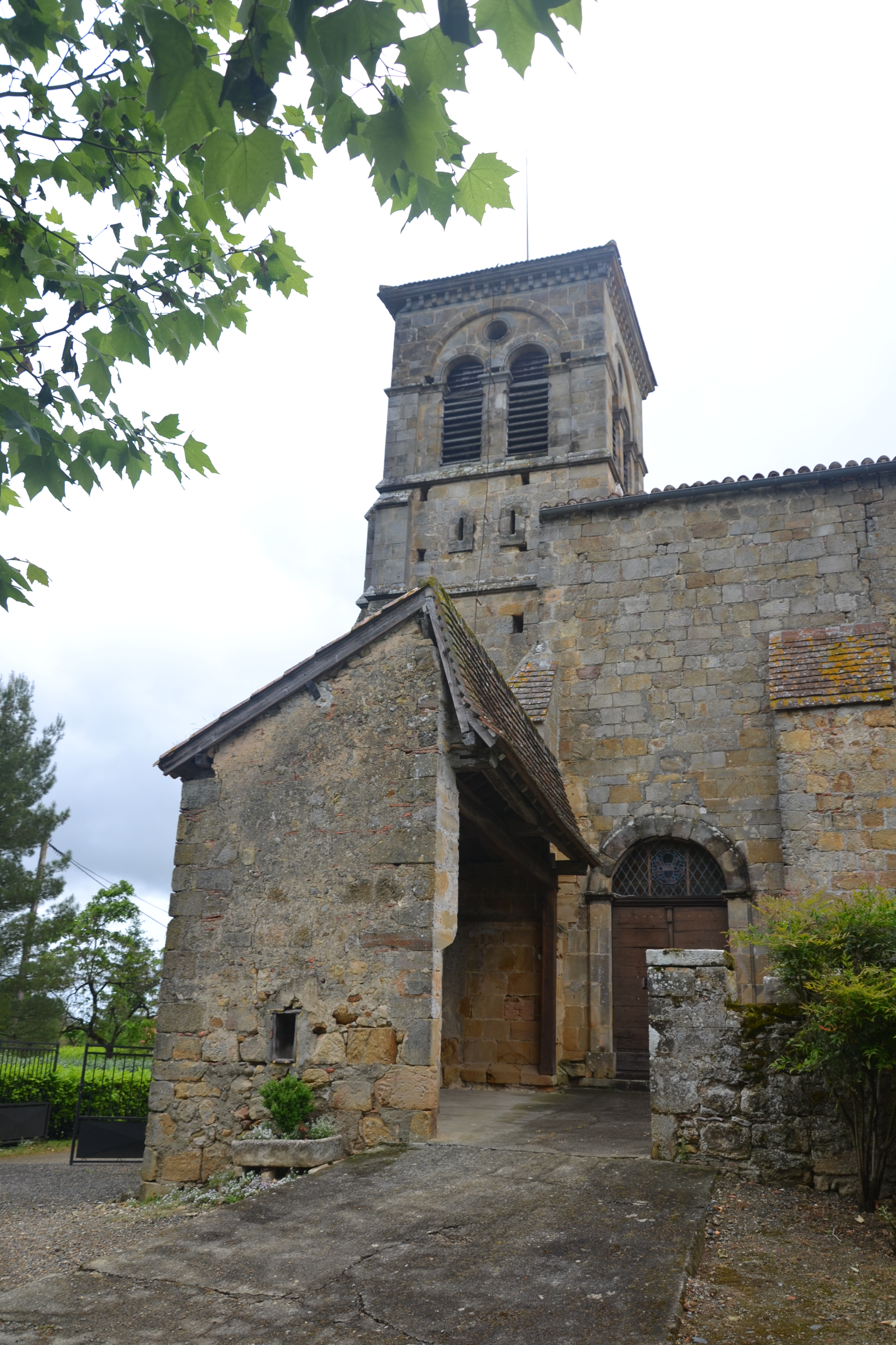 église de Sarragachies